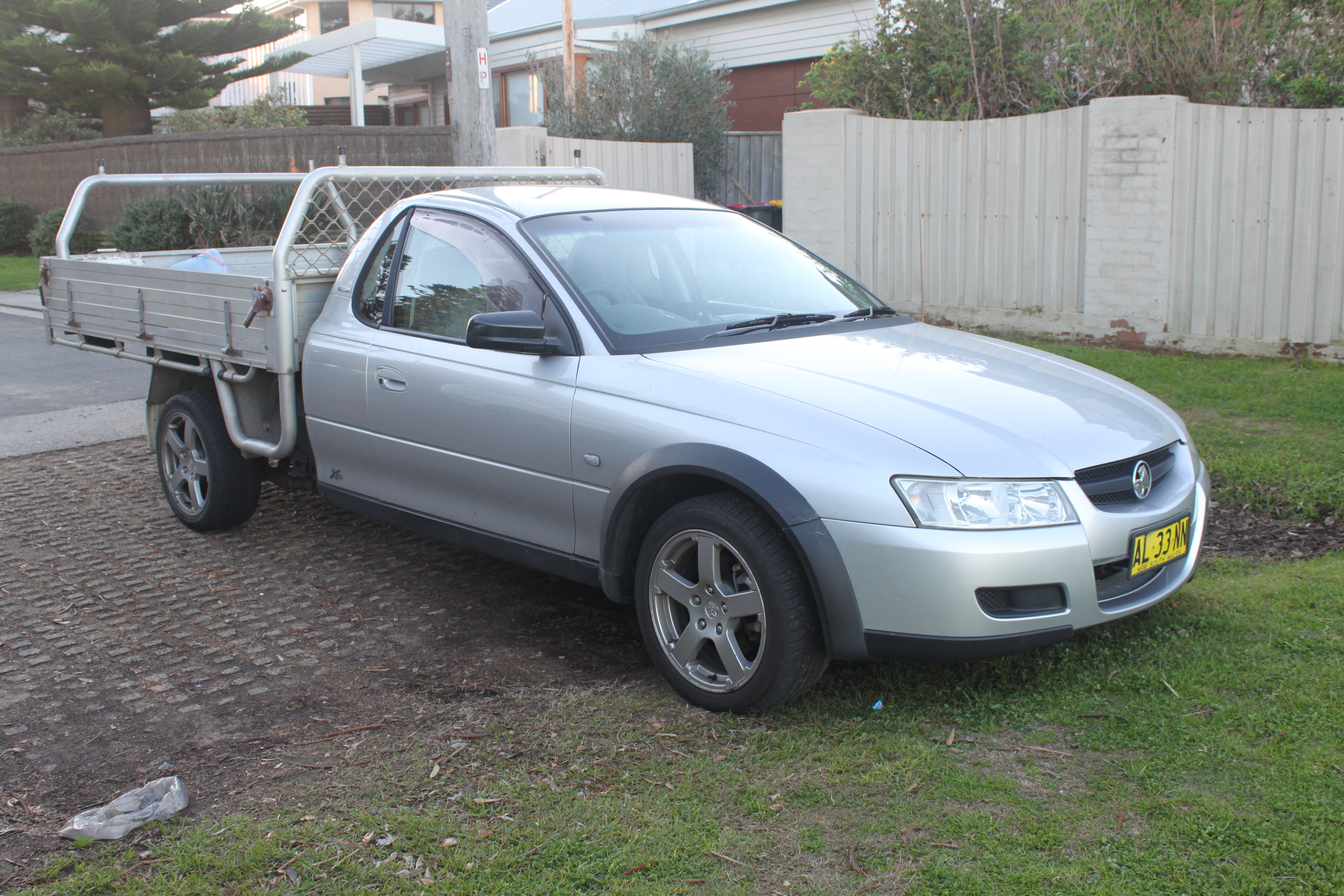 Holden VZ One Tonner Cross 6